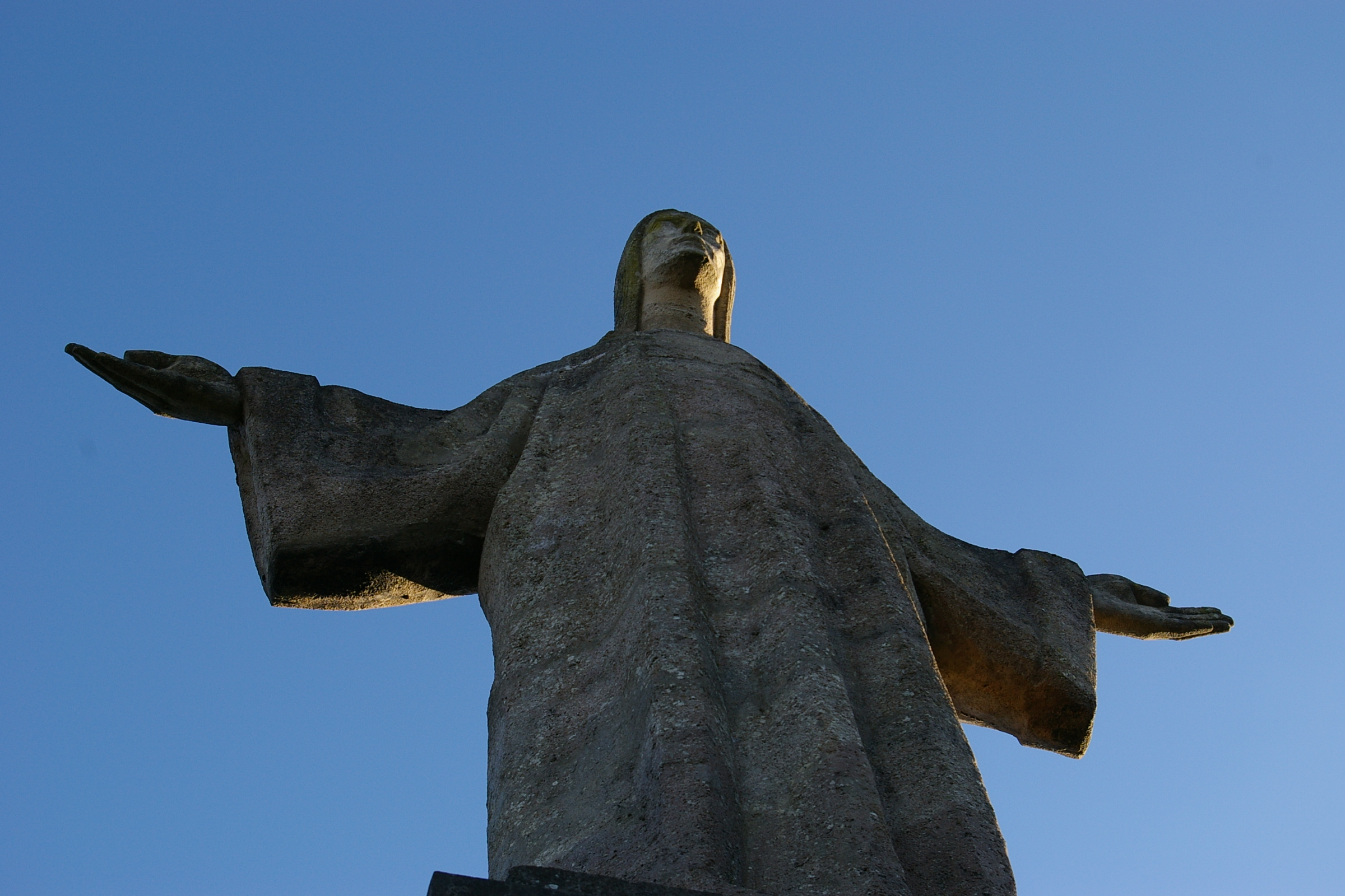 statue du Sacré-Coeur à Viviers (Torcé-Viviers-en-Charnie)